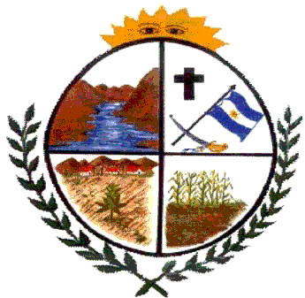 Escudo de la municipalidad de Campo Santo.